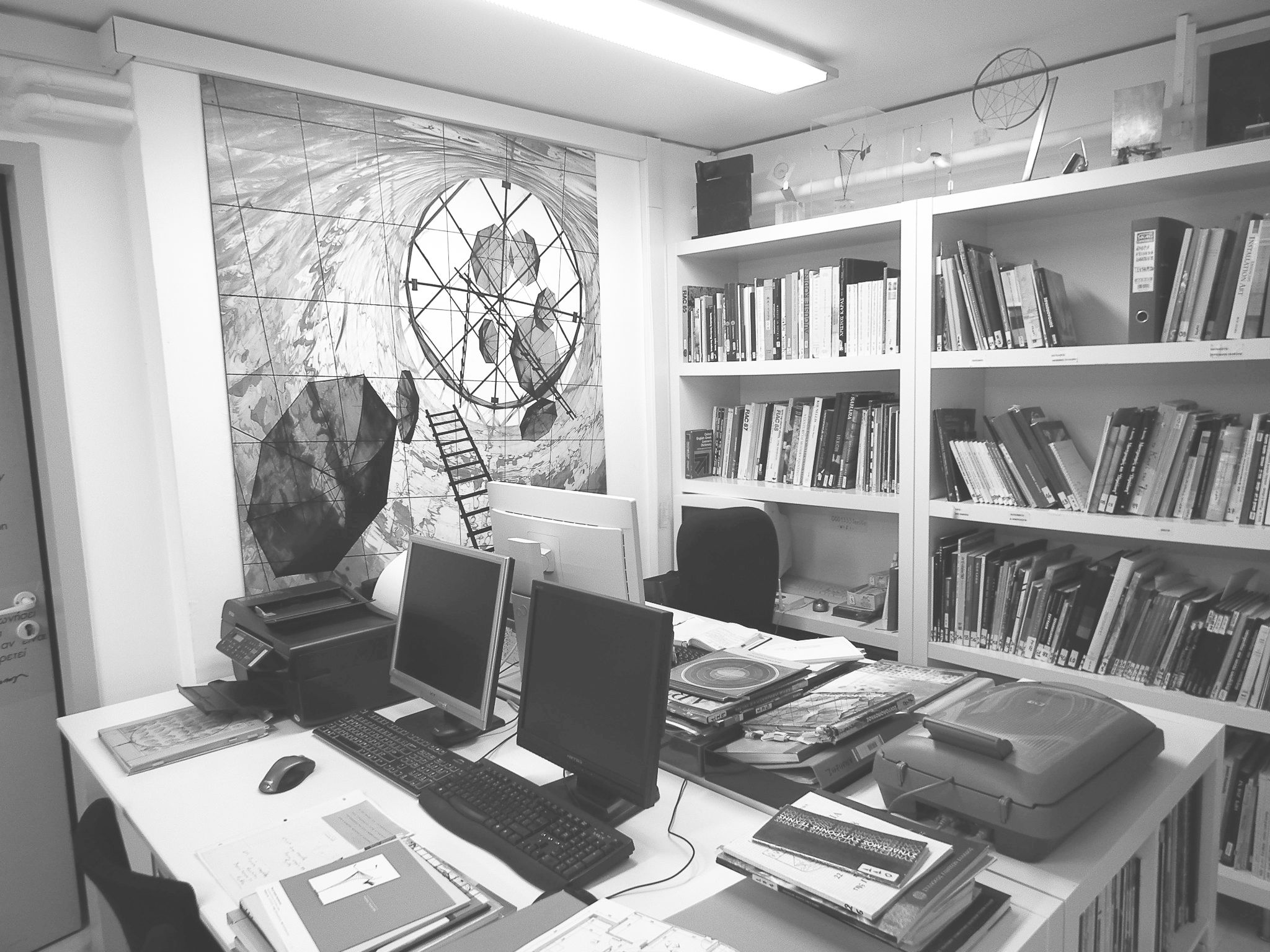 Άποψη του Ιδρύματος Γεωργίου Ζογγολόπουλου